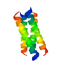 proteïna rocker